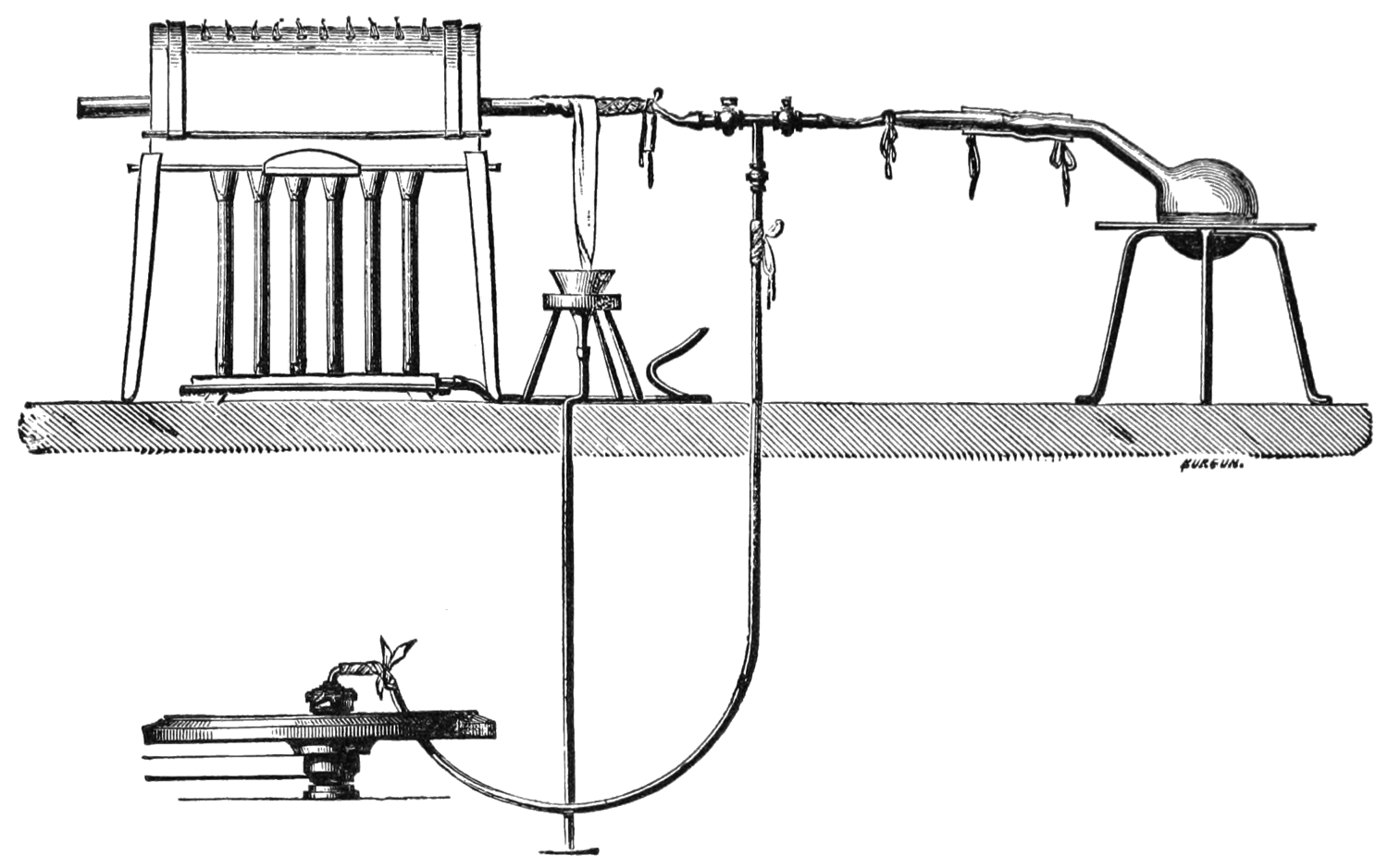 Pasteur apparatus for germ studies